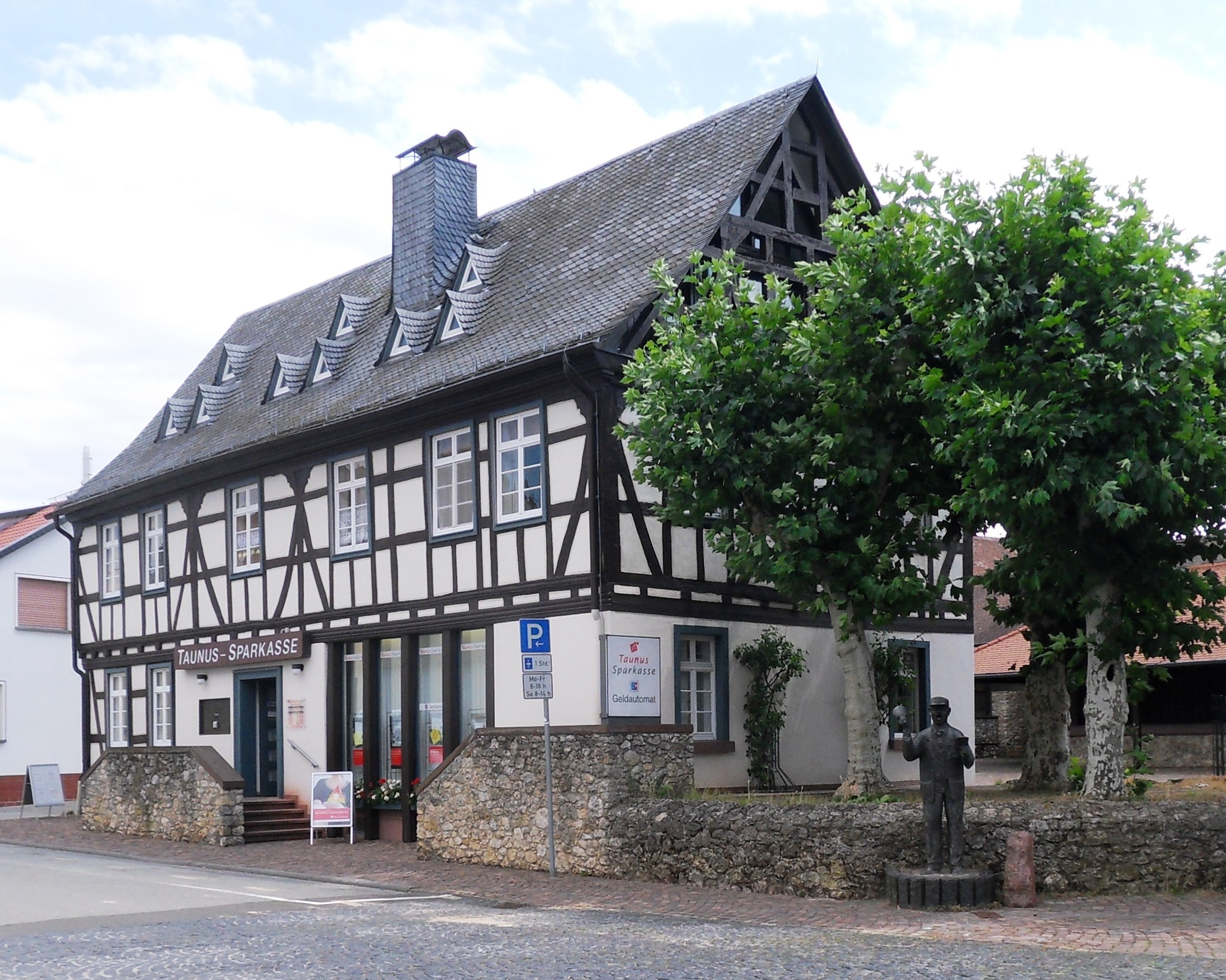 Der ehemals als Gasthof genutzte Fachwerkbau des 17. Jahrhunderts in der Taunusstraße 3 in Wicker steht unter Denkmalschutz. Er diente von 1934 bis 1971 der Gemeinde als Rathaus und ist damit von großer ortsgeschichtlicher Bedeutung